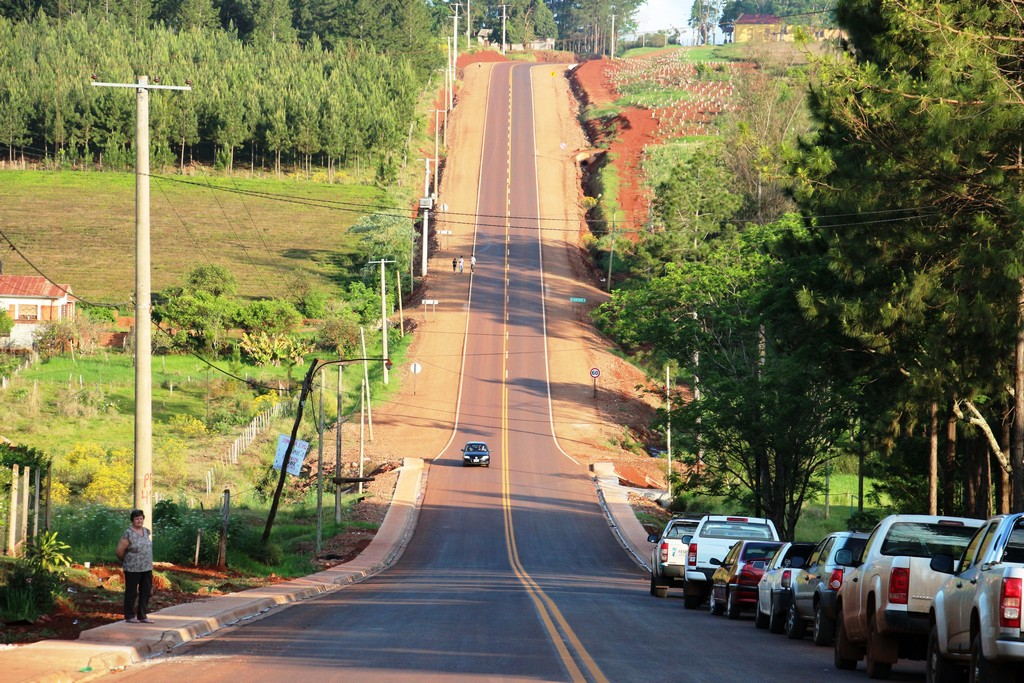 Ruta N° 215 en Mojón Grande, Misiones.